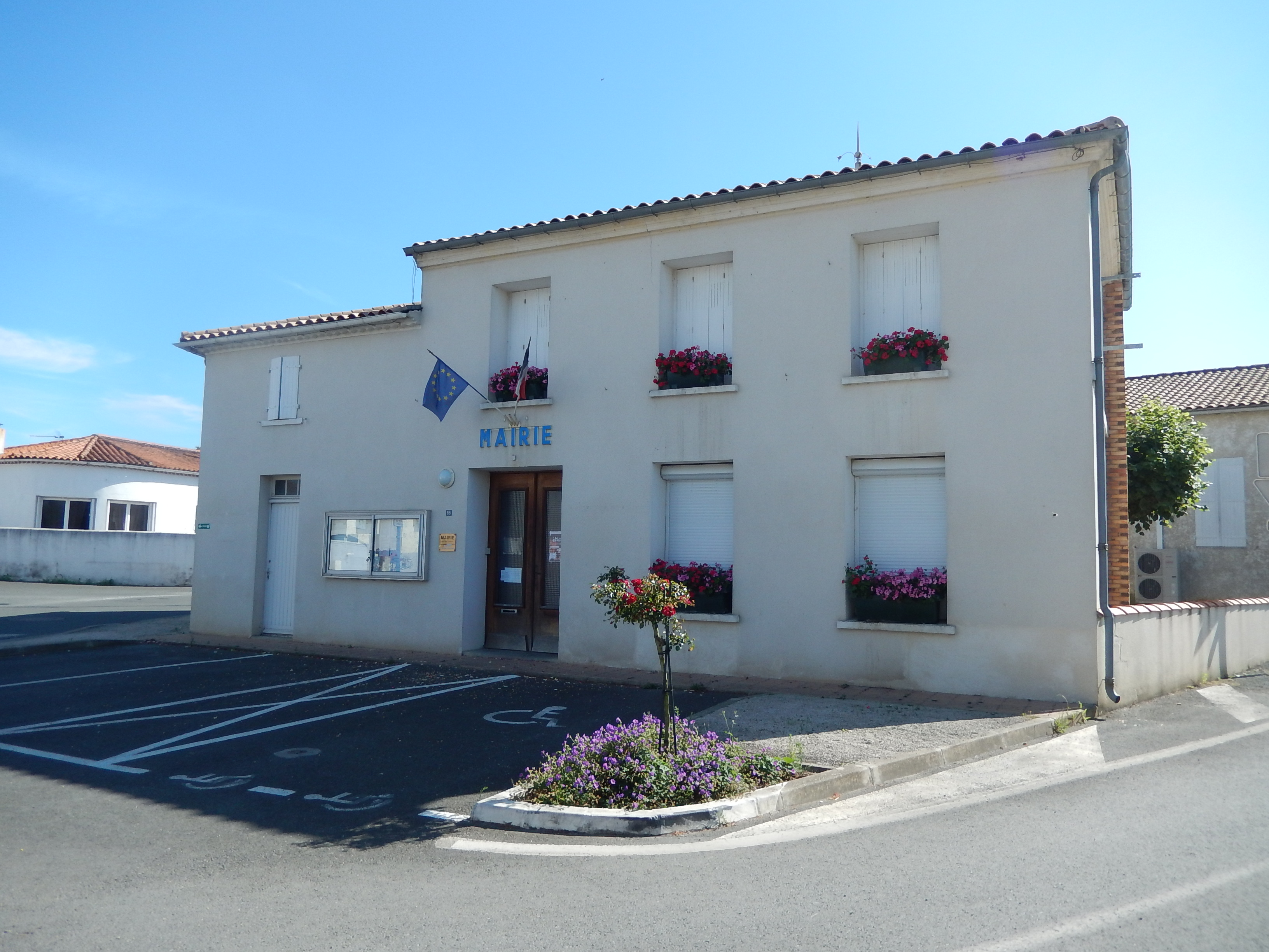 La mairie de la commune de Sablonceaux, en Charente-Maritime.